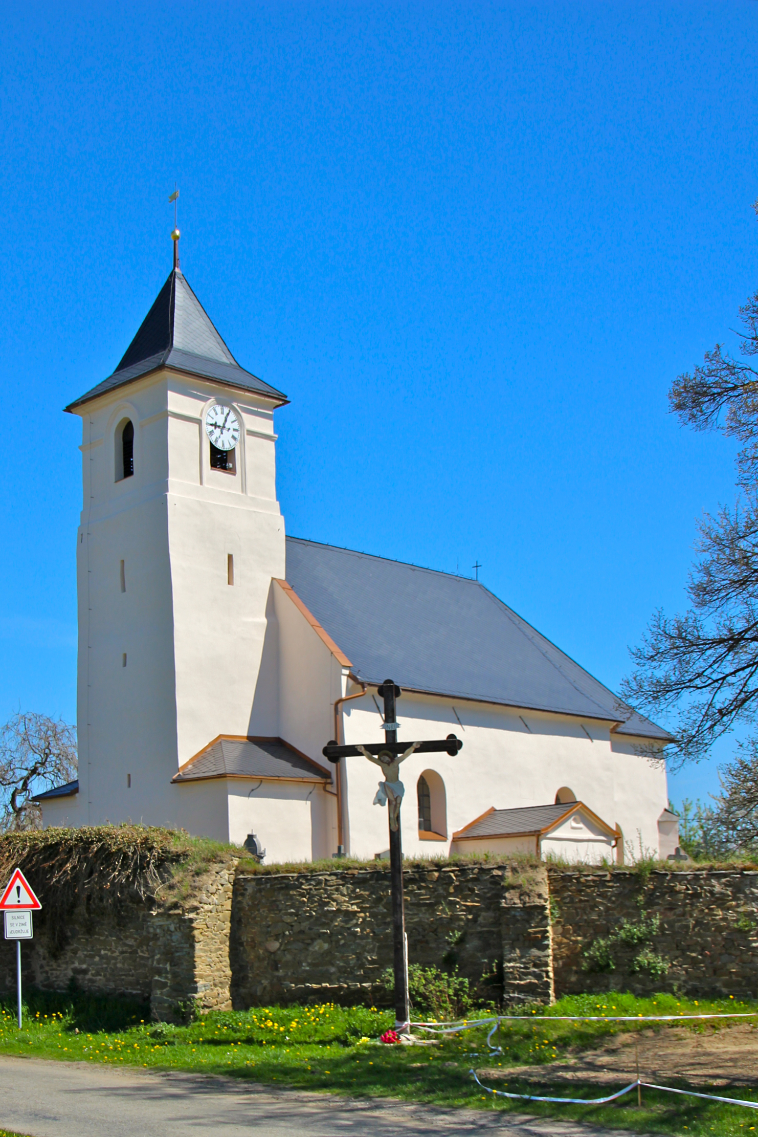 Hrozová – wieś w Czechach, w powiecie Bruntál, w kraju morawsko-śląskim, w gminie Rusín.